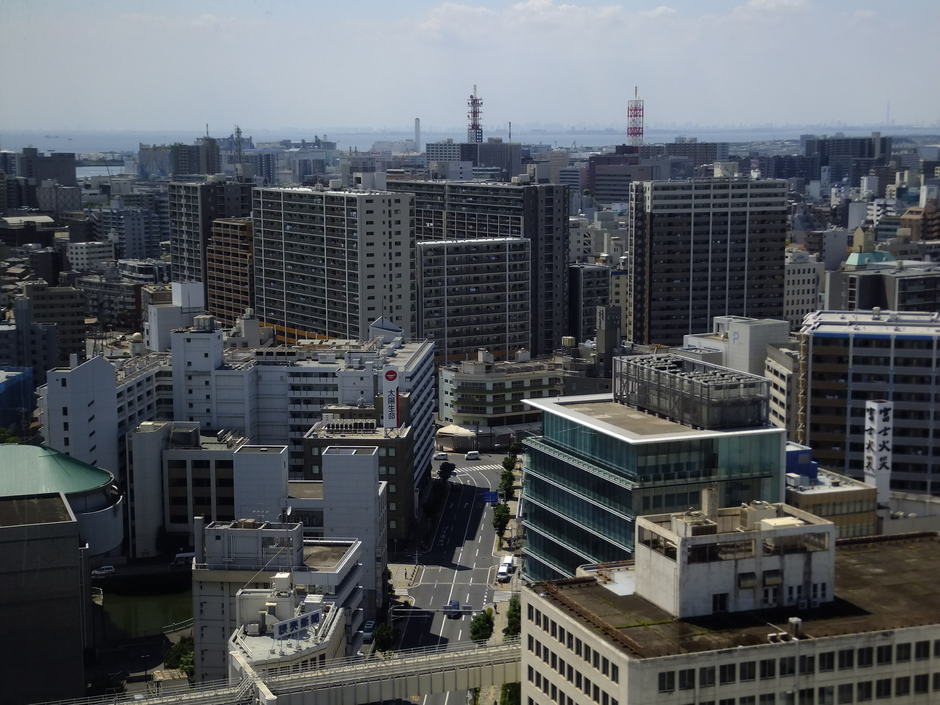 千葉県庁本庁舎からの眺め、千葉市中心街方向